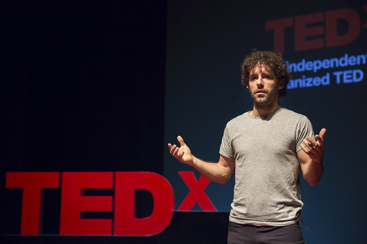 Víctor Lobo durante su charla en TEDx Zaragoza.